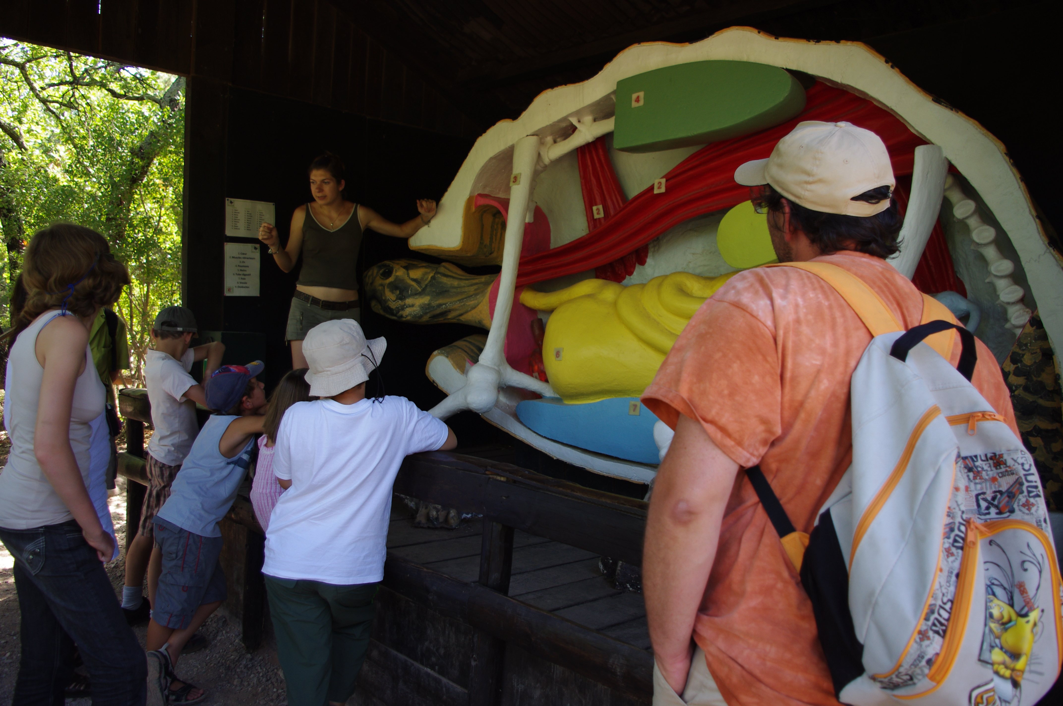 village des tortues gonfaron (var)